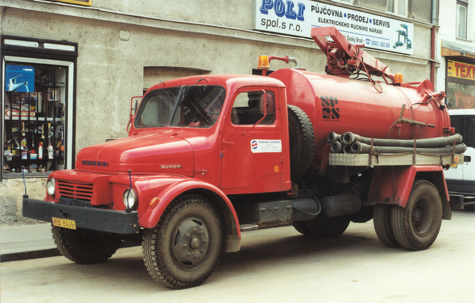 Sací vůz Praga S5T Vodovodů a kanalizací Říčany v Českém Brodě, ul. Krále Jiřího. Tento typ je modifikací klasického fekálního vozu a sloužil k tlakovému čištění kanalizací a jímek. Vůz je vybaven tlakovým čerpadlem a pomocnou nádrží na vodu o objemu 0,5 m³. Na hlavní nádrži je umístěna savice na otočném výložníku. Nádrž je sklopná, její zadní víko je odklápěcí. Vozidlo je postaveno na podvozku S5T-3 Super.